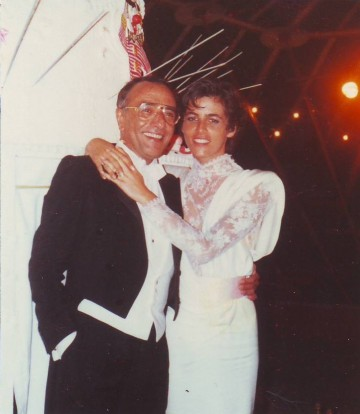 Yves Mourousi, journaliste et présentateur de télévision français, et son épouse Véronique, lors de leur mariage en 1985.